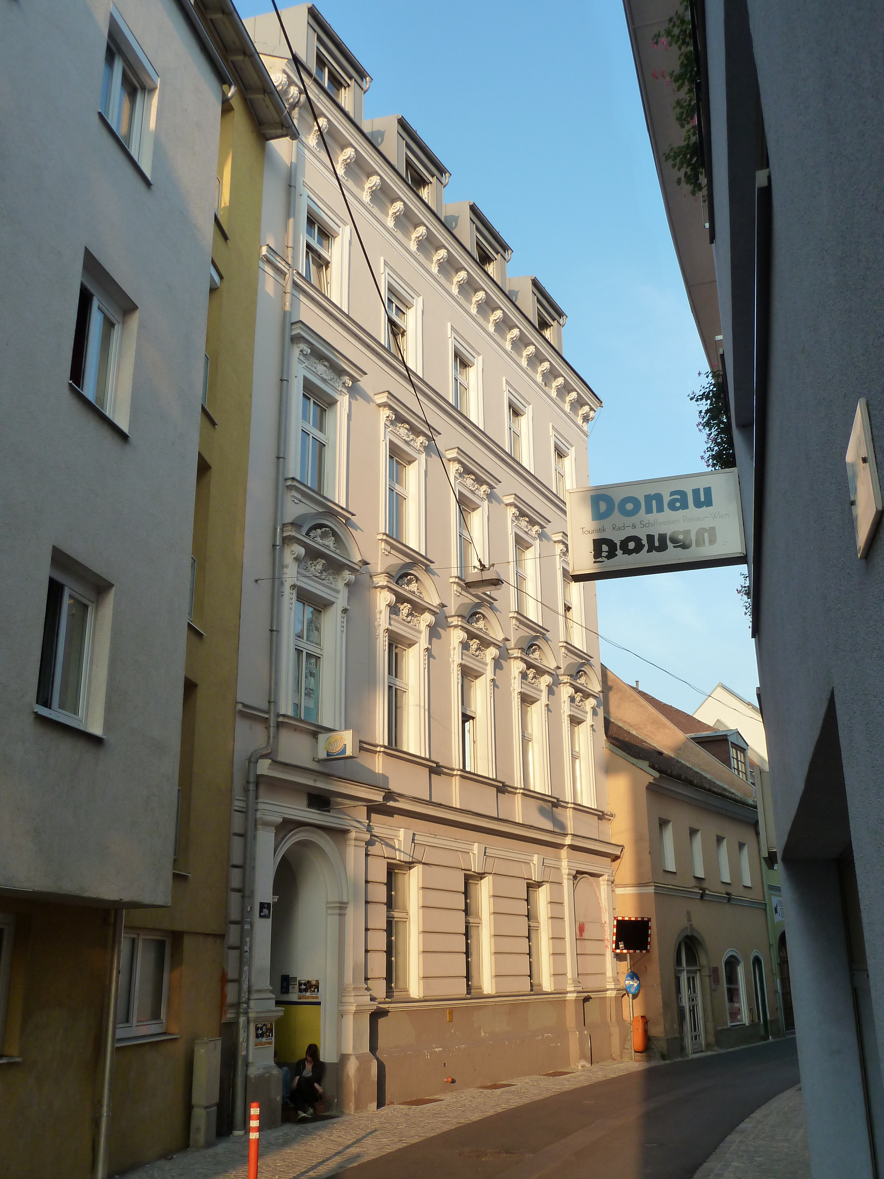 Jugendzentrum VIF